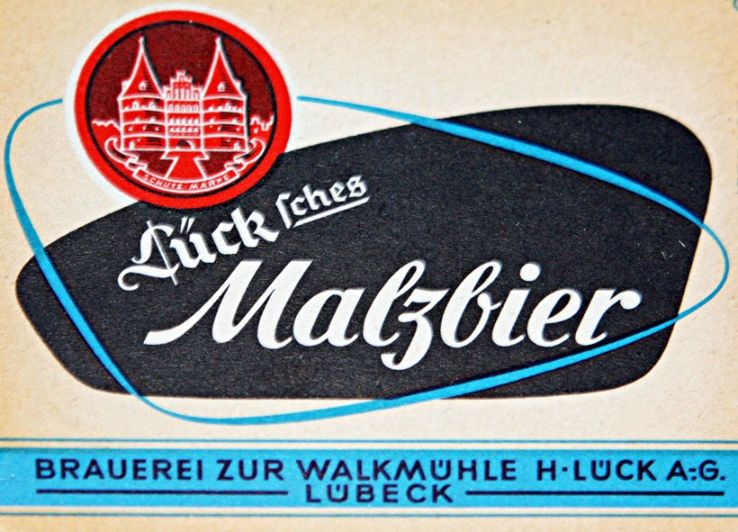 Bieretikett Lück Malzbier